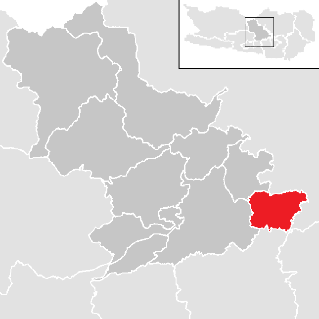 Bezirk Feldkirchen